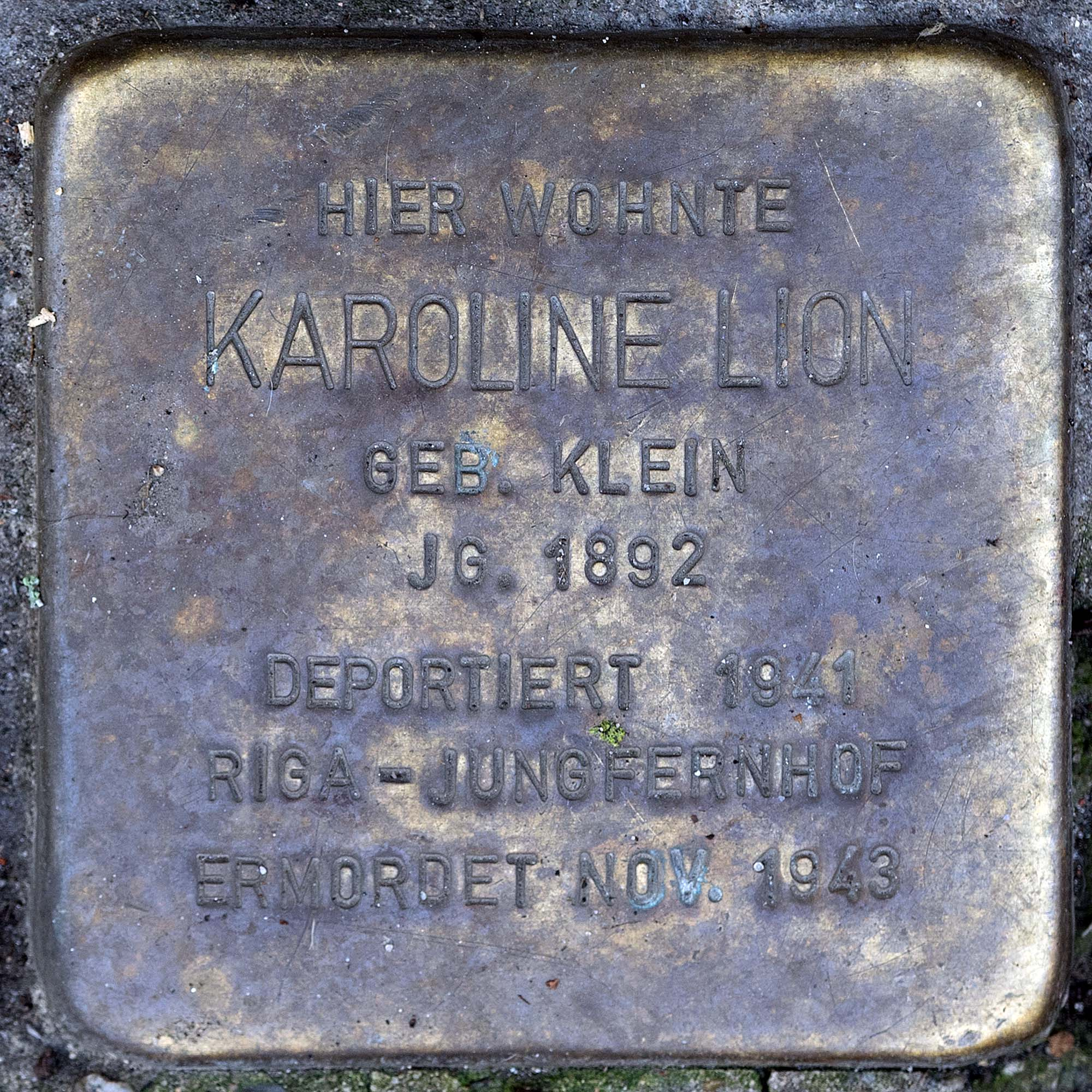 Stolperstein für Lion Karoline